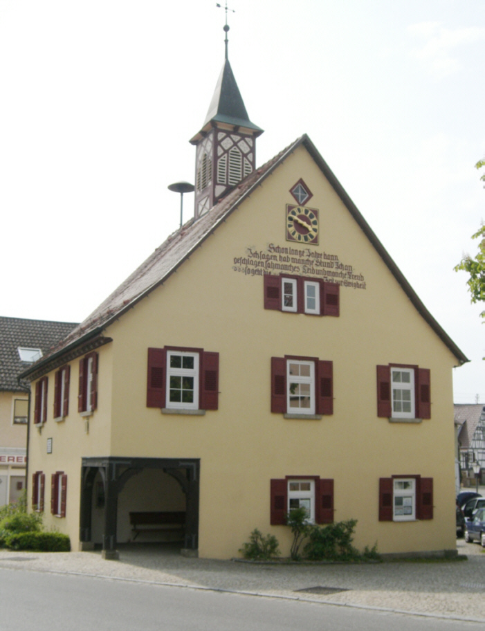 Altes Rathaus in Balzholz